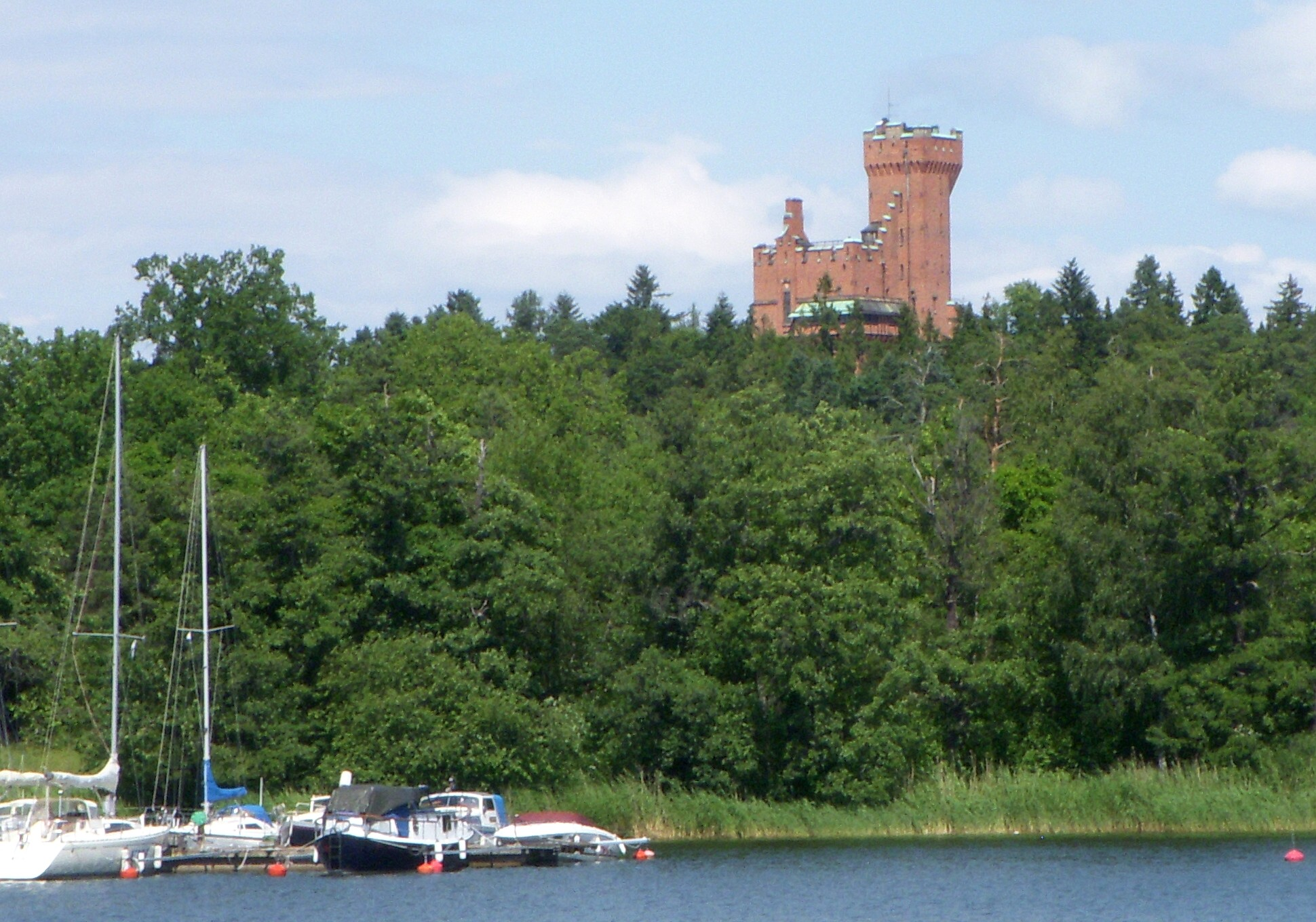 Cedergrenska tornet, Stocksund